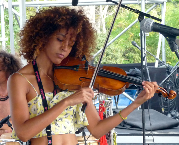 Yilian Canizares à Marseille en juillet 2015